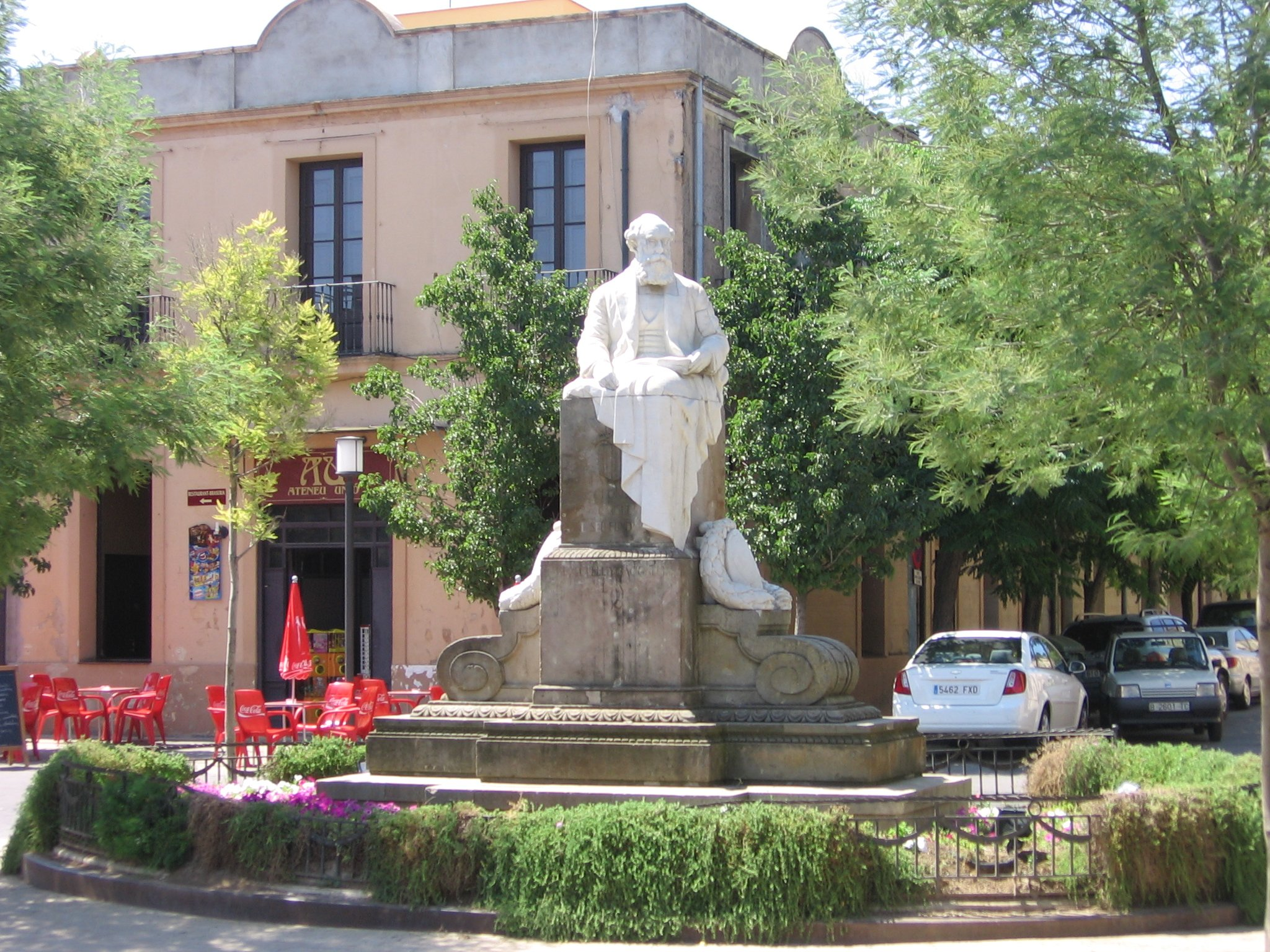 Monumento a Eusebi Güell, en la Colonia Güell (Santa Coloma de Cervelló, provincia de Barcelona)